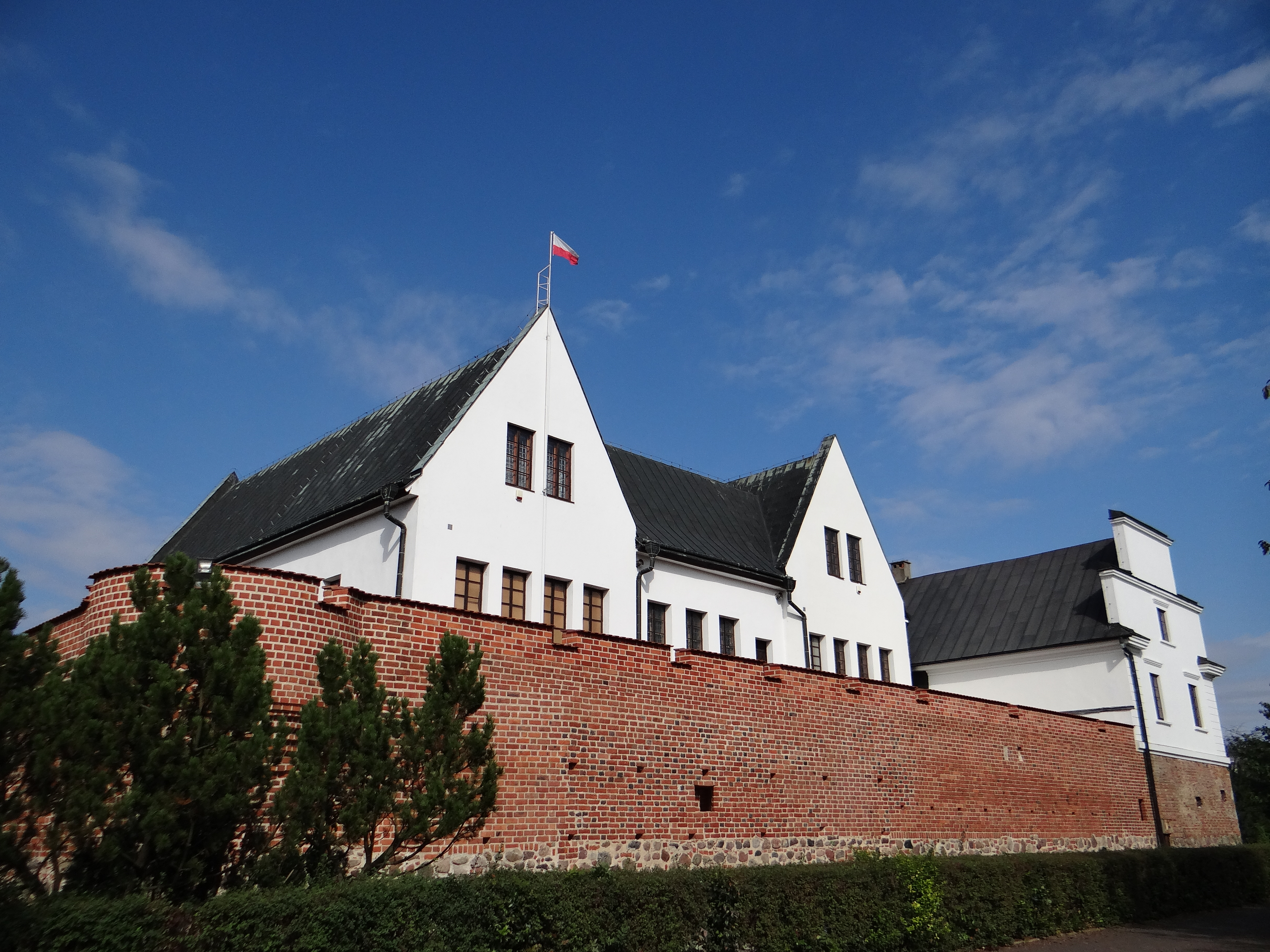 Zabytkowy zamek z XIV w. Koninie - Gosławicach, ul. Muzealna 6